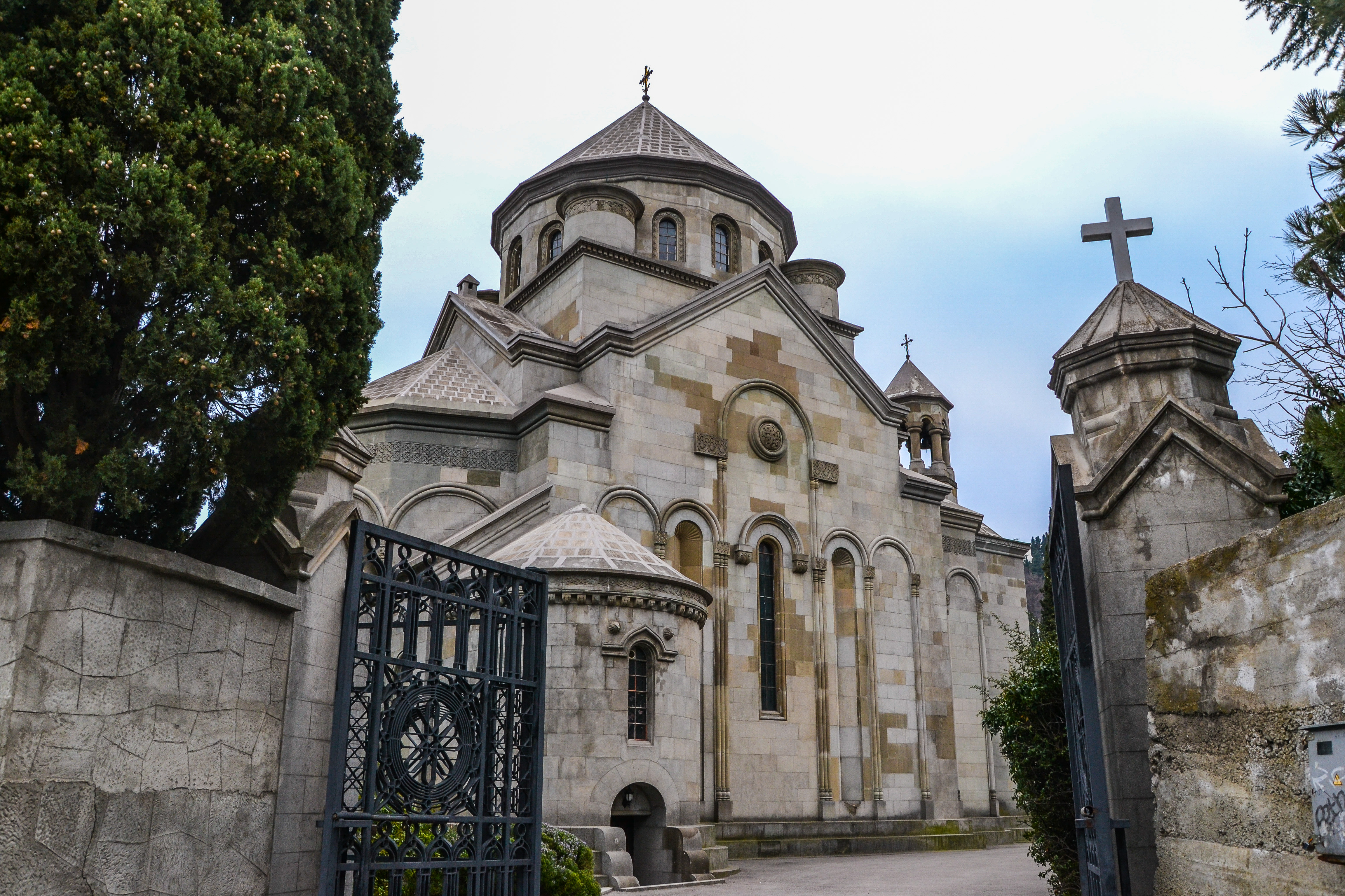 Церква вірменська, Ялта, вул. Загородня, 3, літ. А